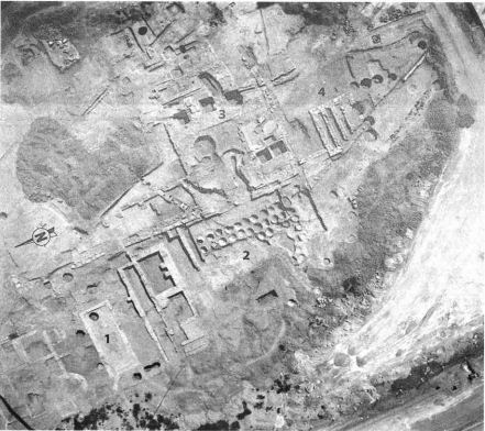 Plànol de la vil·la de la Burguera